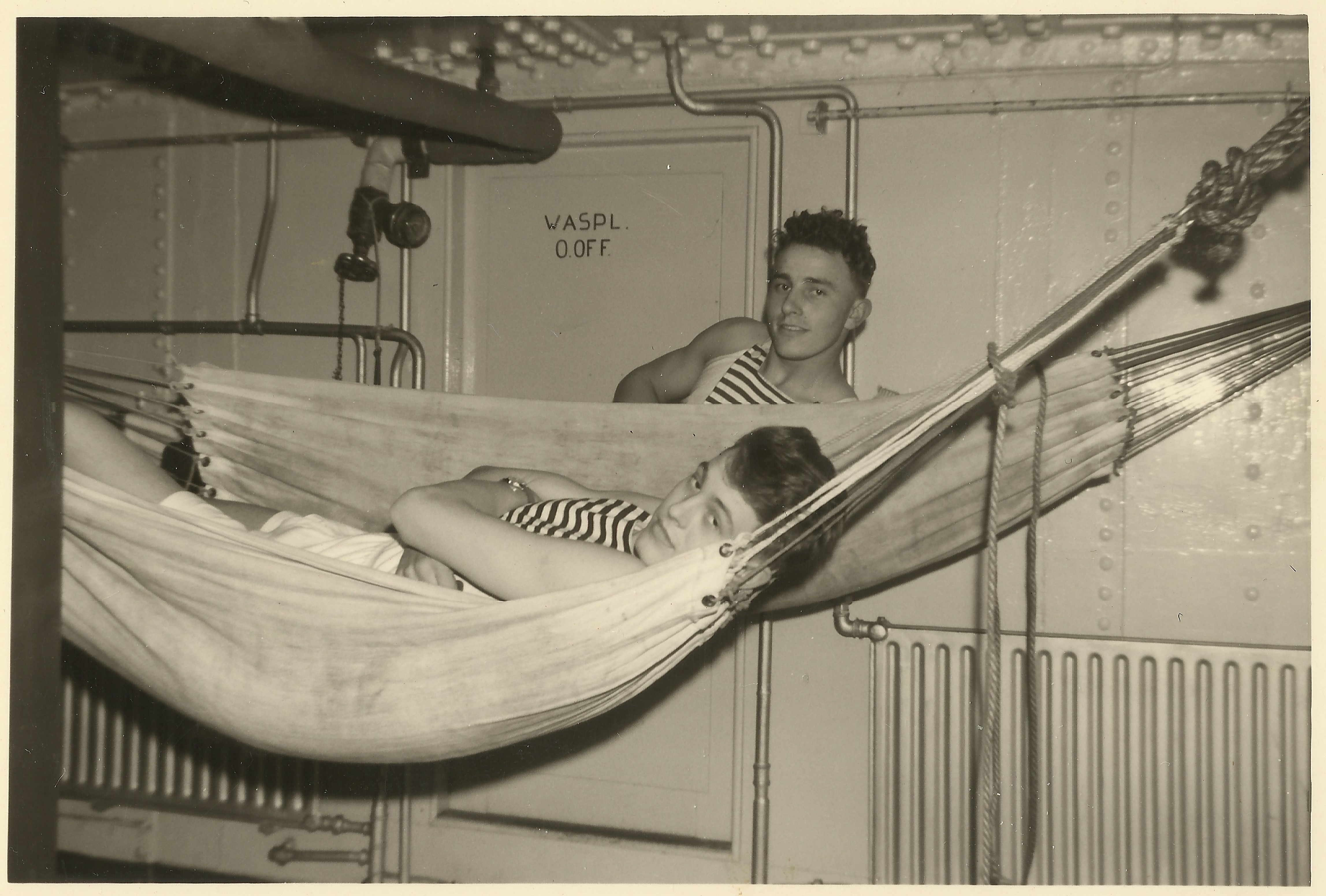 Du mararmeanoj en hamakoj sur Zr Ms Buffel en Amsterdamo